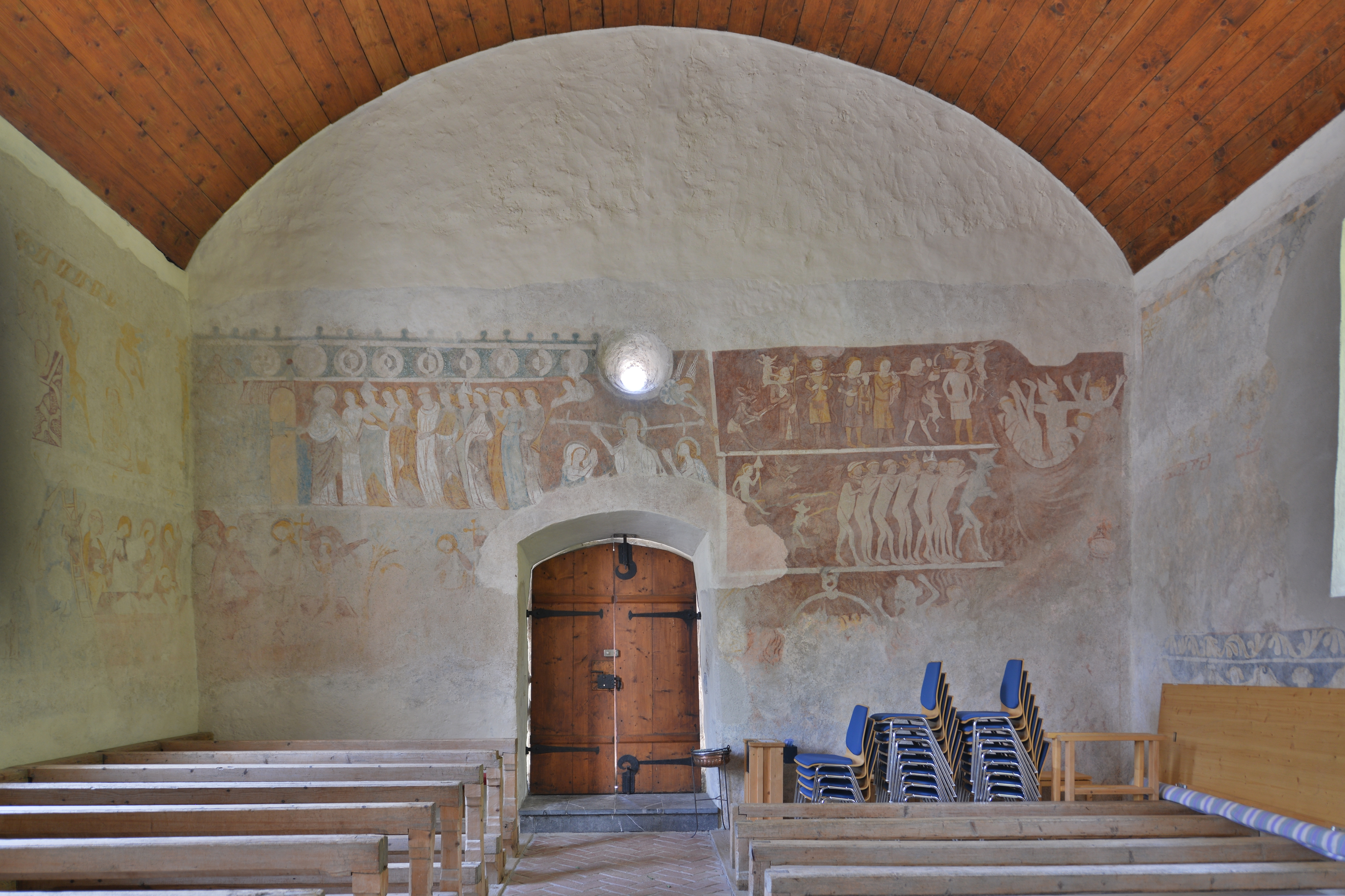 Bludesch, Filialkirche hl. Nikolaus, in Zitz. Urkundlich um 842 "Cise". 1483 Kaplanei. Breiter spätromanischer Bau mit eingezogenem quadratisch barockem Chor unter gemeinsamen Satteldach, Rechteckfenster; Nord-Tur, mit gekoppelten un einfach darüber gestellten Schallöffnungen, vorkragendem Giebelgesims, gemauertem Giebelspitzhelm mit knopfartigen Fialen. Südlich an Langhaus und Chor angebaute Sakristei mit Pultdach von 1629. Im Chor ehemalige Rundapsis durch Ausgrabungen festgestellt, Ummantelung 1629/30.